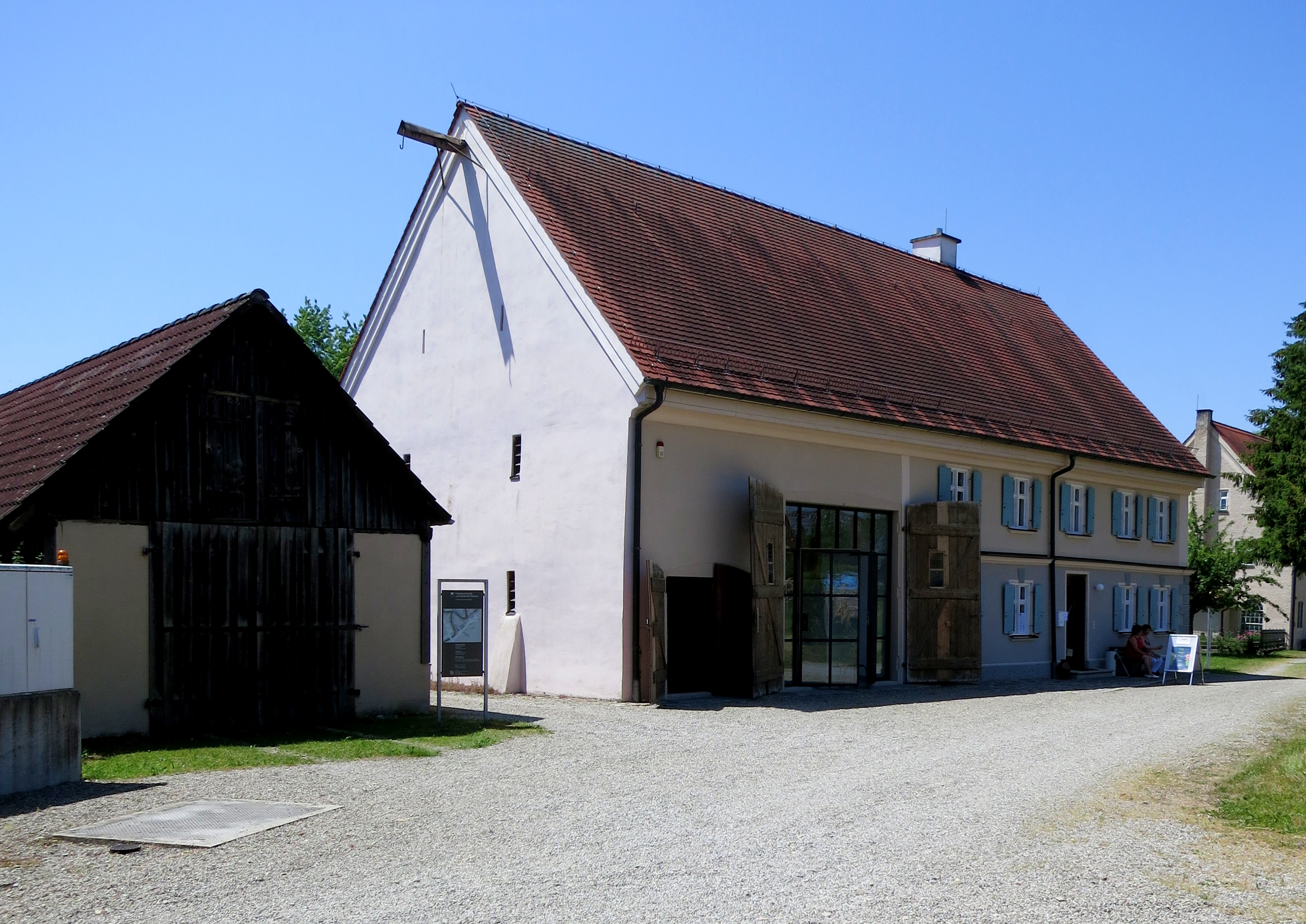 Links Nebengebäude, Mitte Hauptgebäude mit Tenne, Stall und Wohntrakt, rechts das Gebäude der Hammerschmiede, Aufnahme aus SüdOst